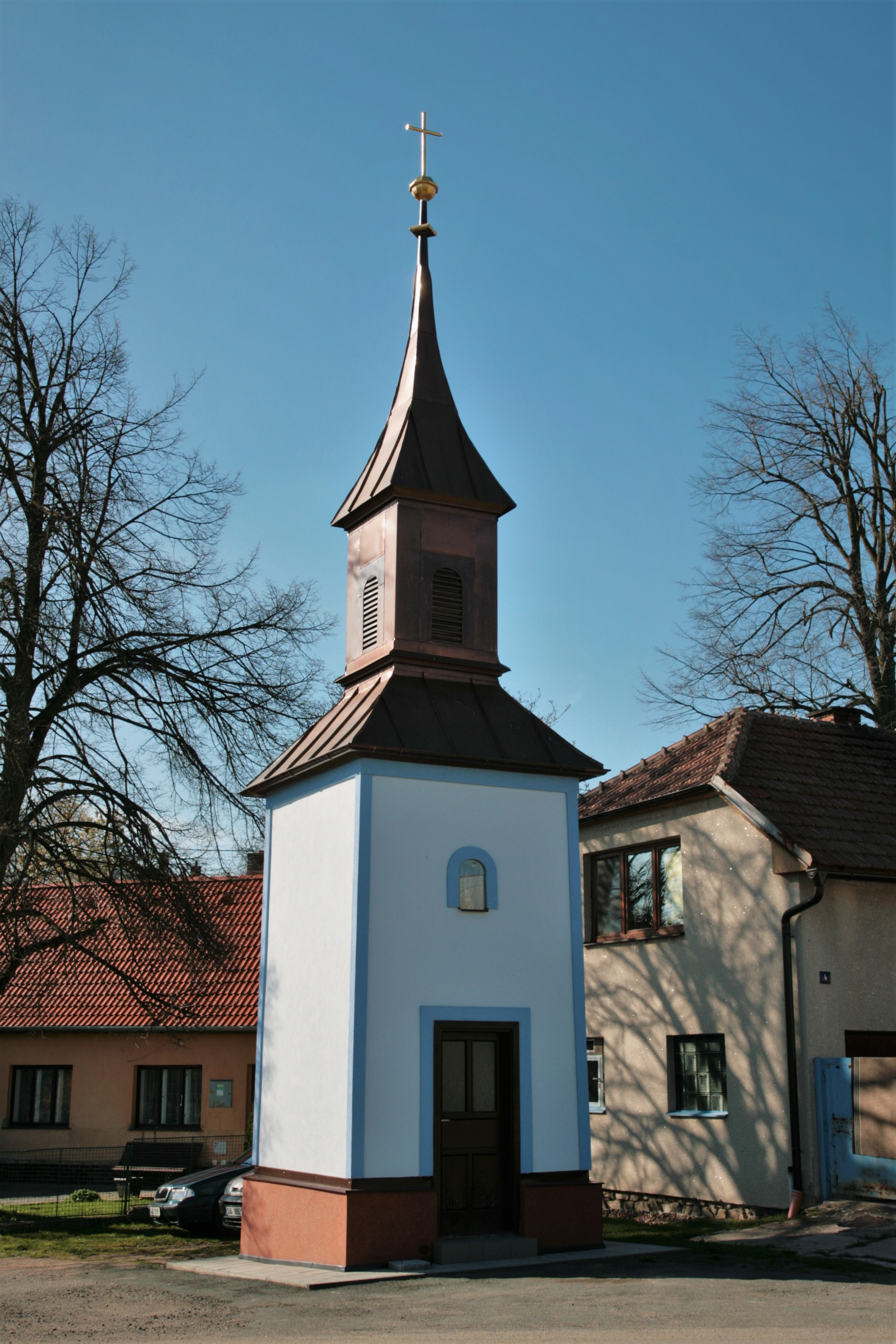 Obec Vratislávka v okrese Brno-venkov. Kaple na návsi.